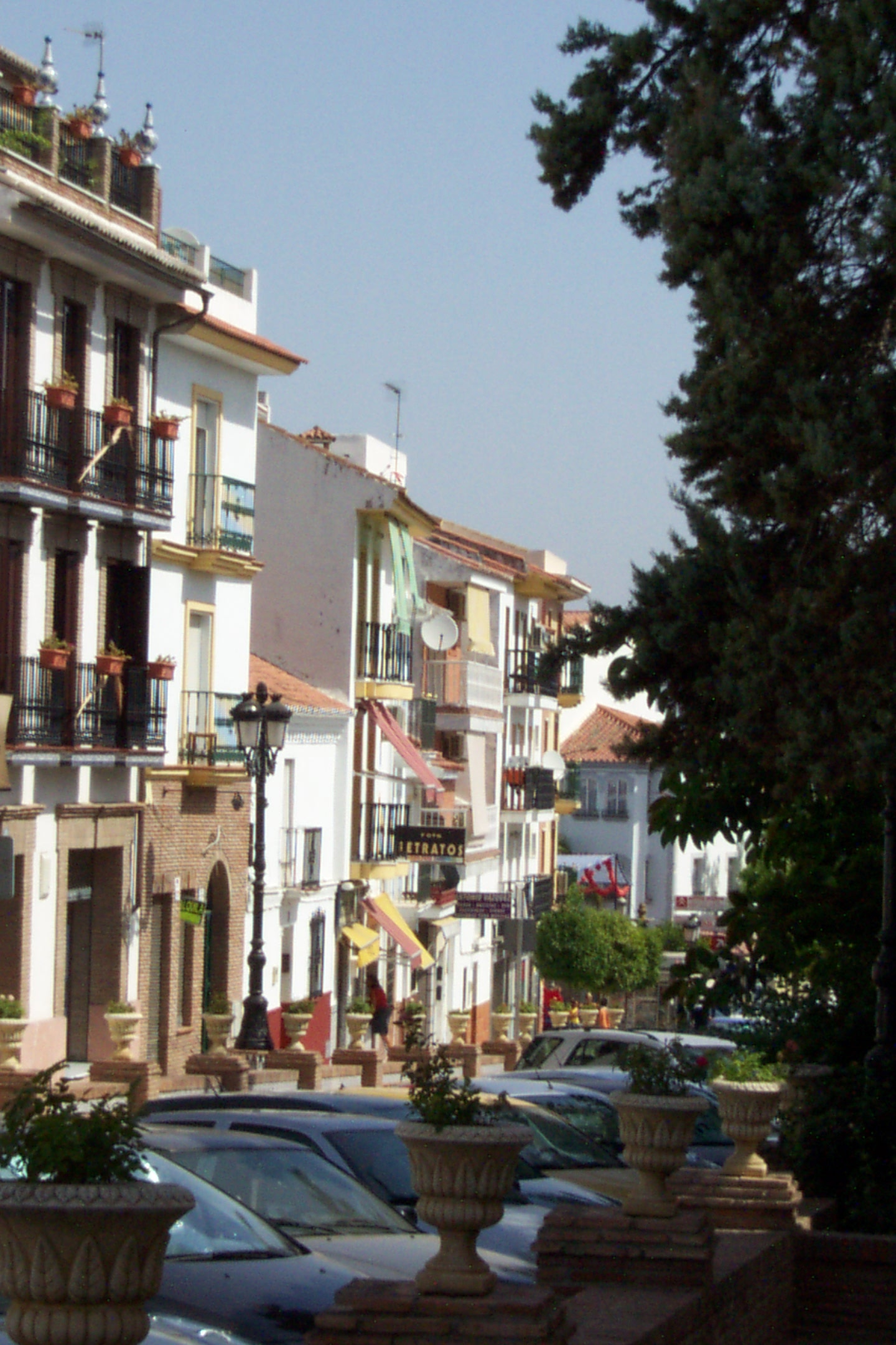 Alhaurín de la Torre, Spain.